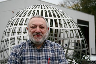 Foto di Vitaly Bergelson